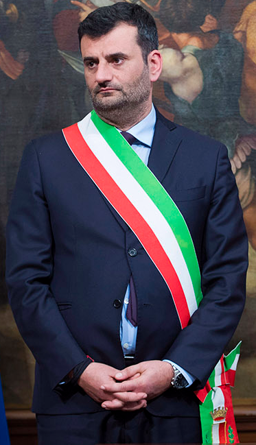 Il sindaco di Bari e presidente dell'ANCI Antonio Decaro a Palazzo Chigi